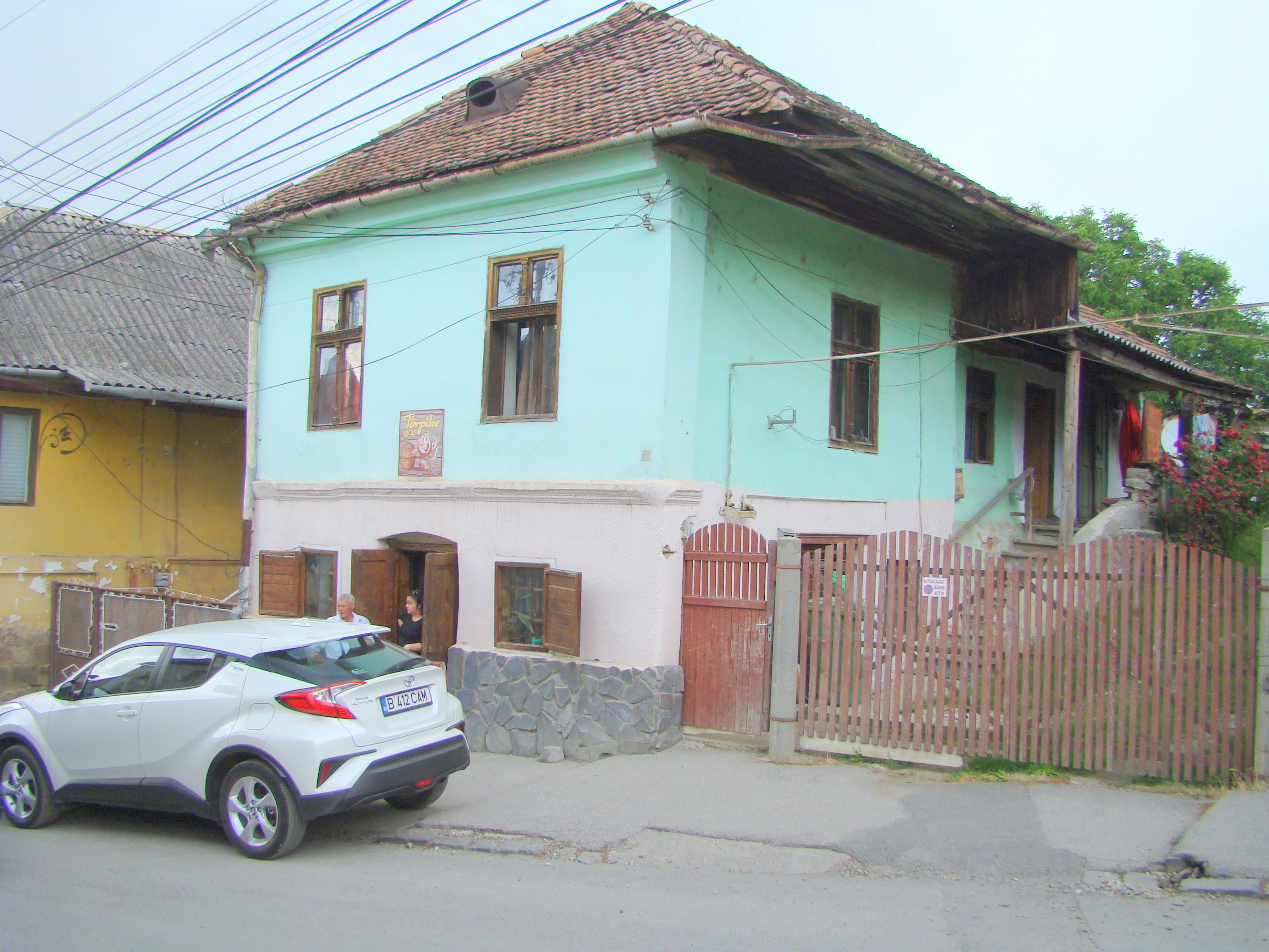 Casă de meșteșugar, cu prăvălie la parter, municipiul Odorheiu Secuiesc, str. Szent Imre 41 sec. XIX